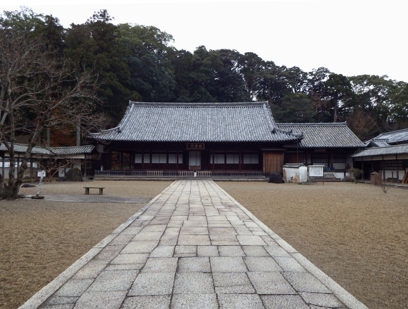 丈六寺の境内